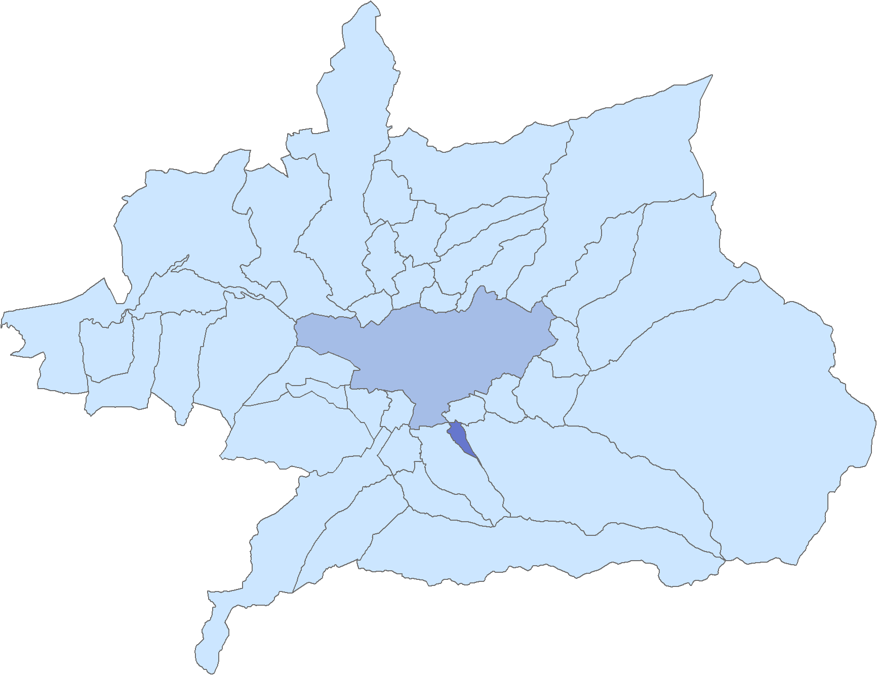 Situación del municipio de Cájar respecto a la comarca de la Vega de Granada, en España.